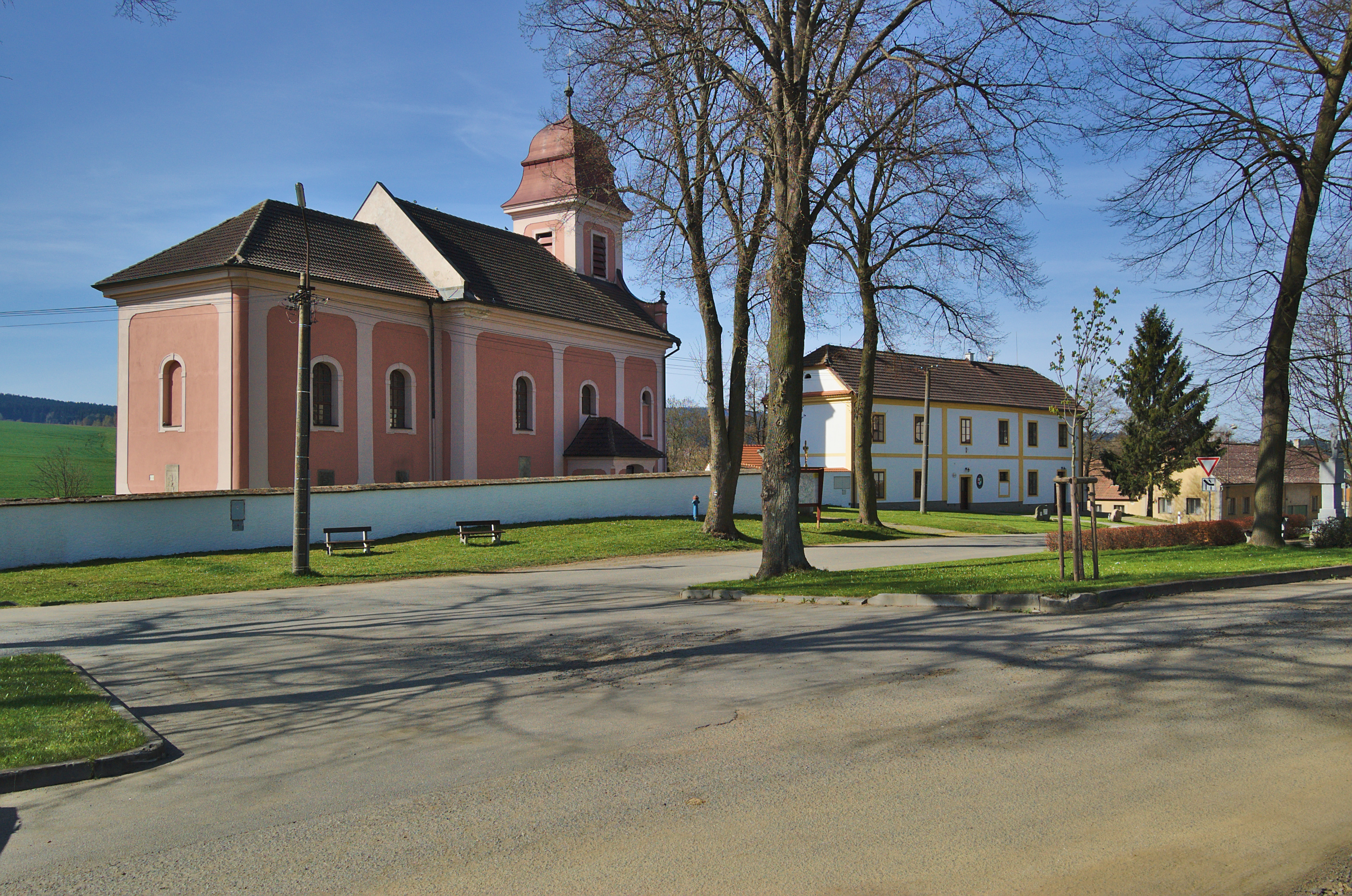 Kostel svatého Jiří a Fara, Věžná, okres Pelhřimov Project: Fotíme Česko